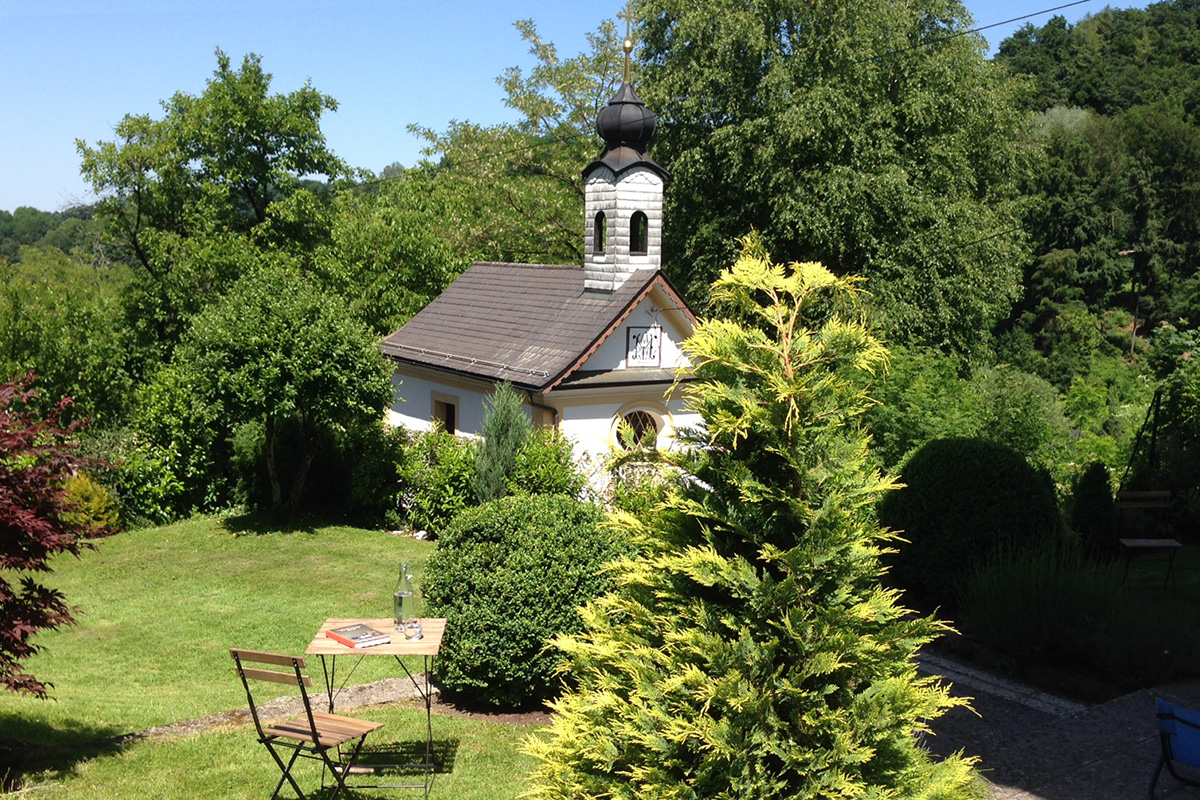 Die Kapelle Maria Luggau im Salzburger Stadtteil Gnigl, Österreich von Außen; vom Garten der Haslachmühle mit Blickrichtung Nordwesten